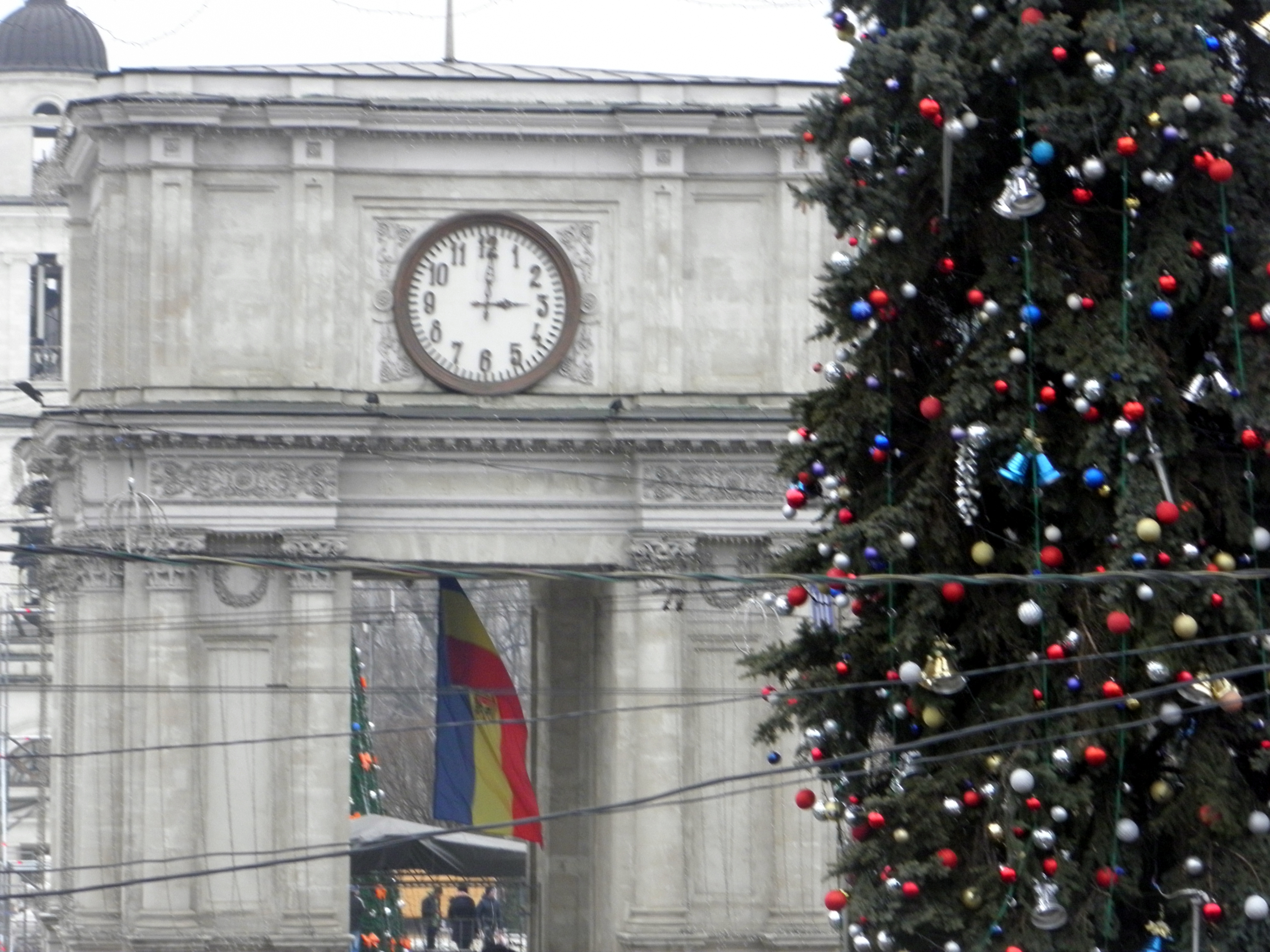 Фрагмент Тріумфальної арки на площі Великого Національного Зібрання